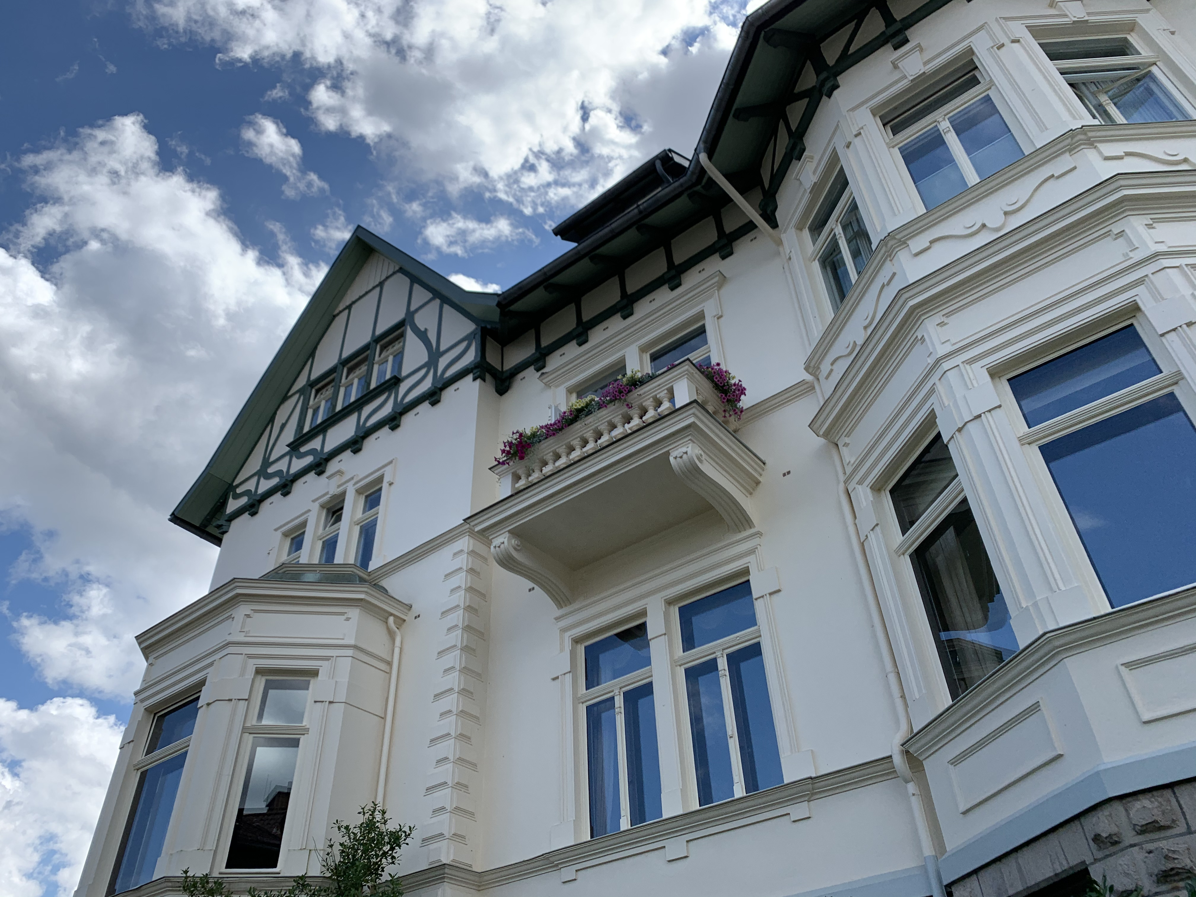 Blick auf die Villa Vida vom Hotel Romantischer Winkel.